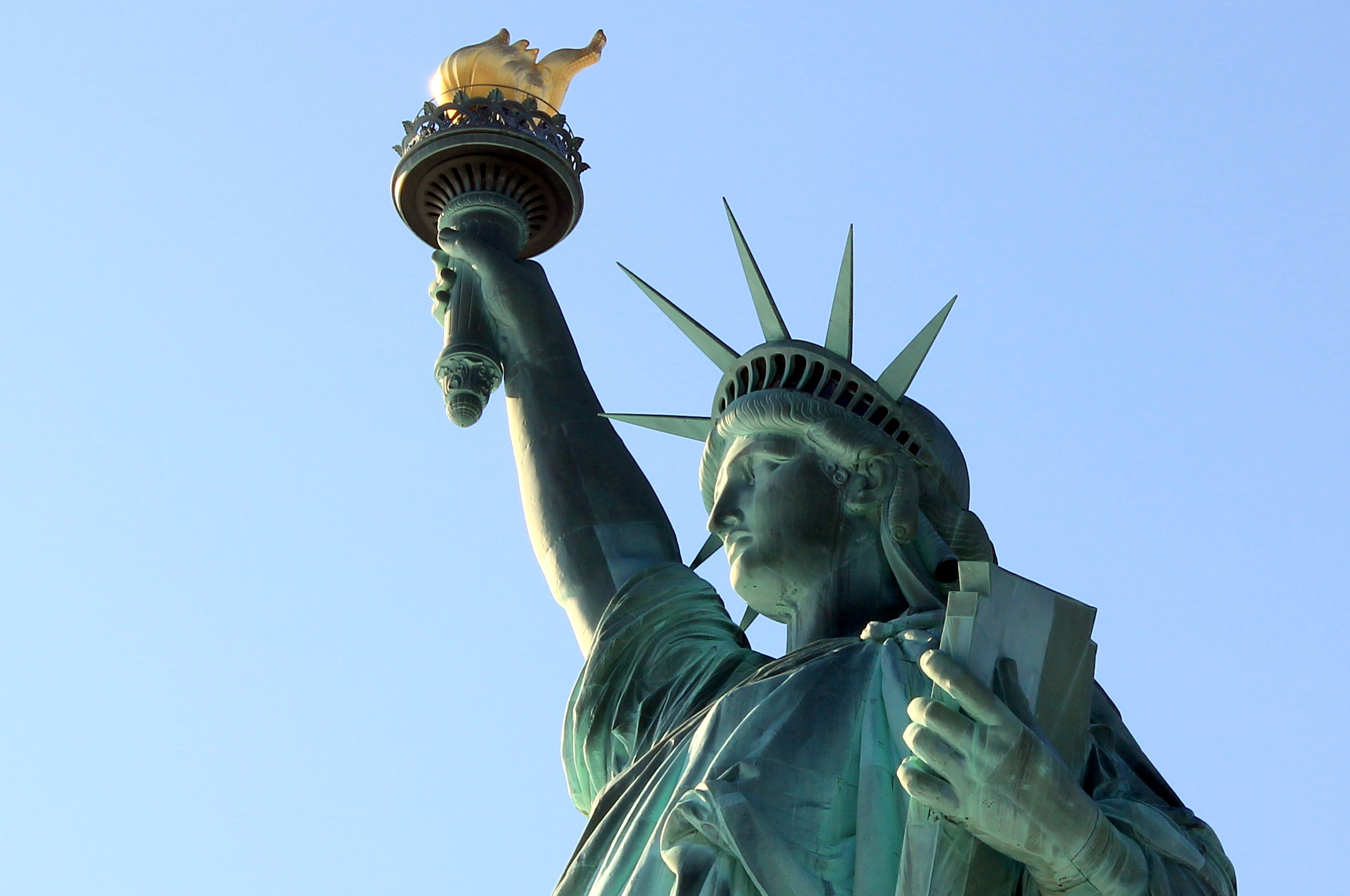 Freiheitsstatue, Liberty Island